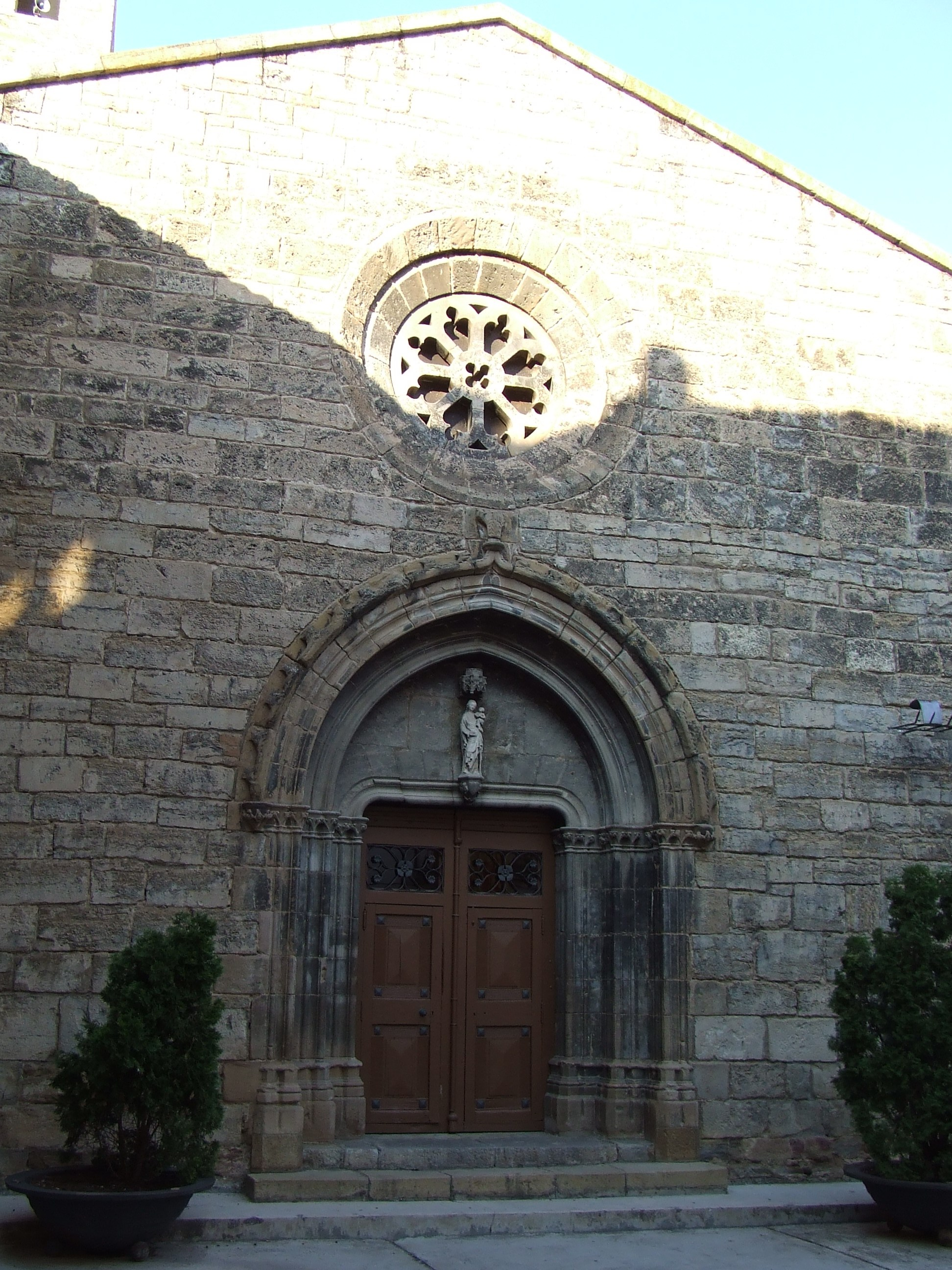 Façana de l'església de Santa Maria d'Isona: únic fragment que no va ser destruït el 1938.